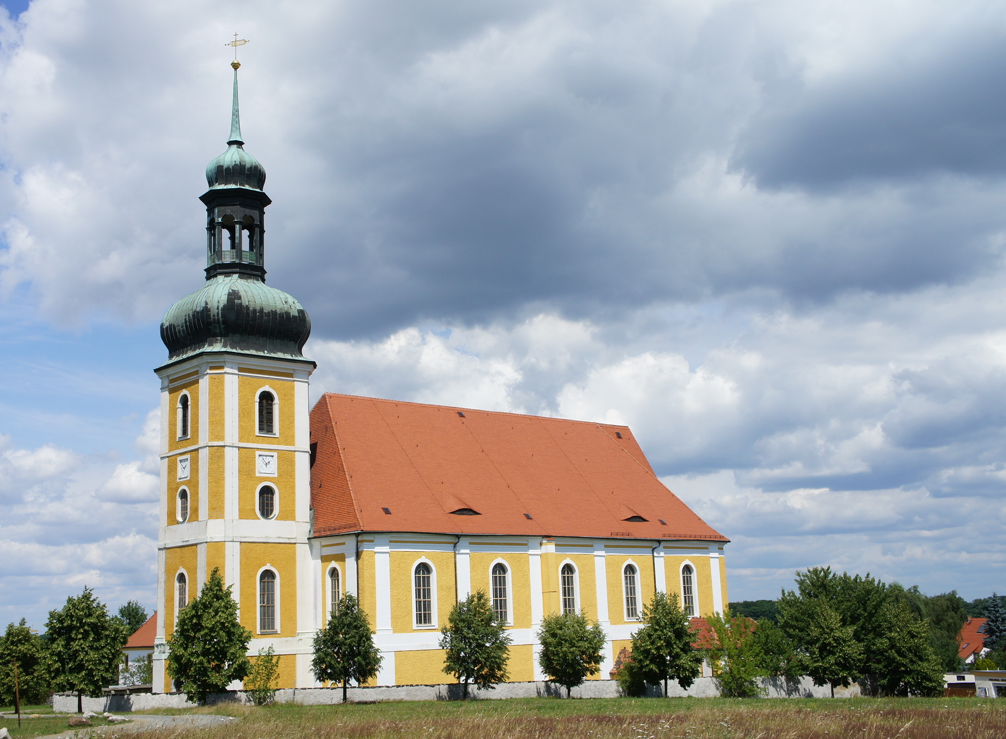 Katholische Wallfahrtskirche Rosenthal. Vorgängerkapelle wurde 1600 erbaut, die dreischiffige Hallenkirche stammt aus dem Jahr 1778. Abgebrannt am 1. Mai 1945 bis auf die Mauern und das Deckengewölbe, dabei konnte das Gnadenbild gerettet werden. 1947 wieder eingeweiht, Außenerneuerung 1979/80, Innenerneuerung 1987.